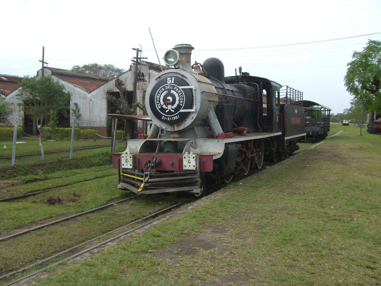 Ferrocarril en Sapucai